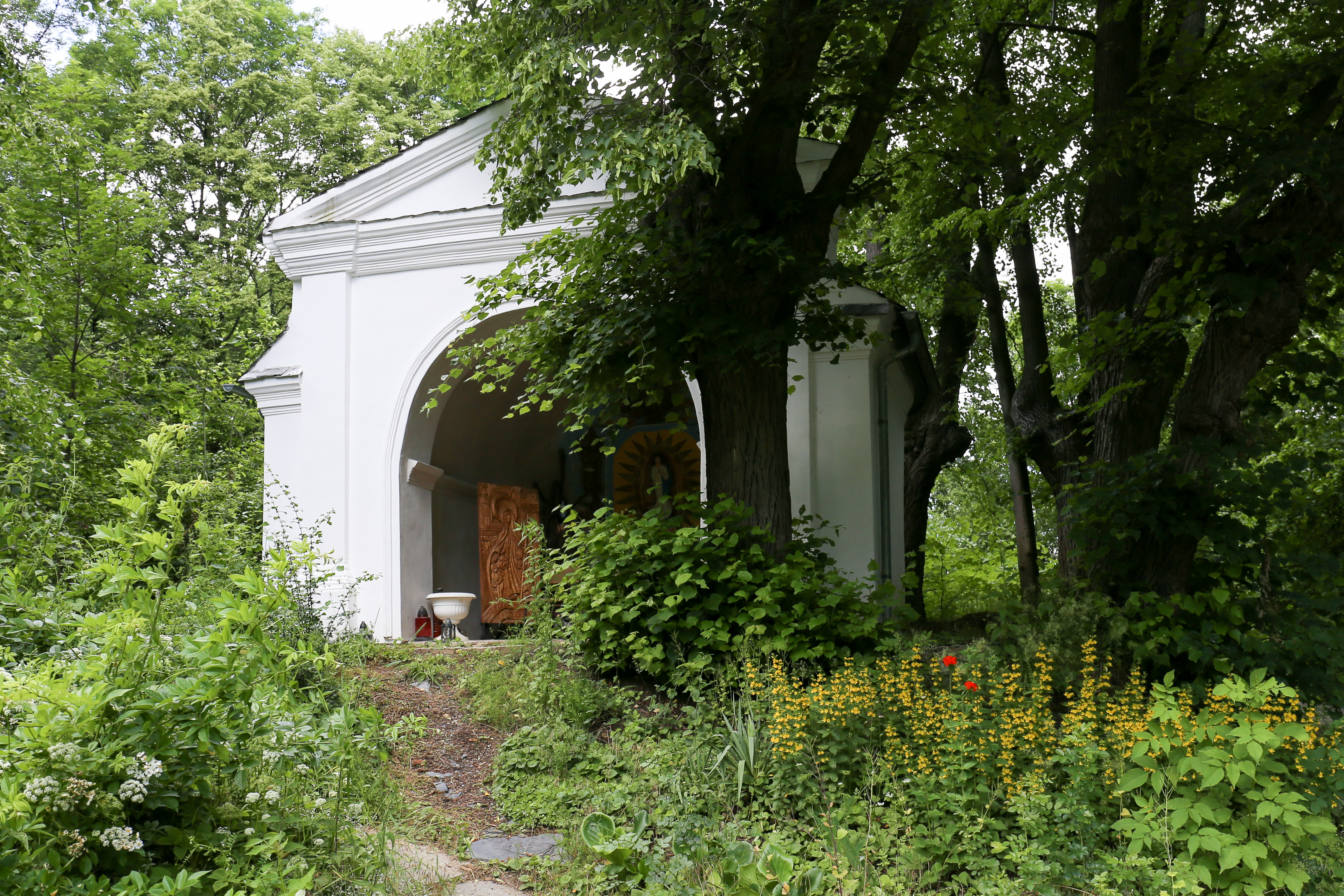 Pelhřimovy - miejscowość, dawniej samodzielna wieś, w Czechach, w kraju morawsko-śląskim, w powiecie Bruntál, w gminie Slezské Rudoltice.